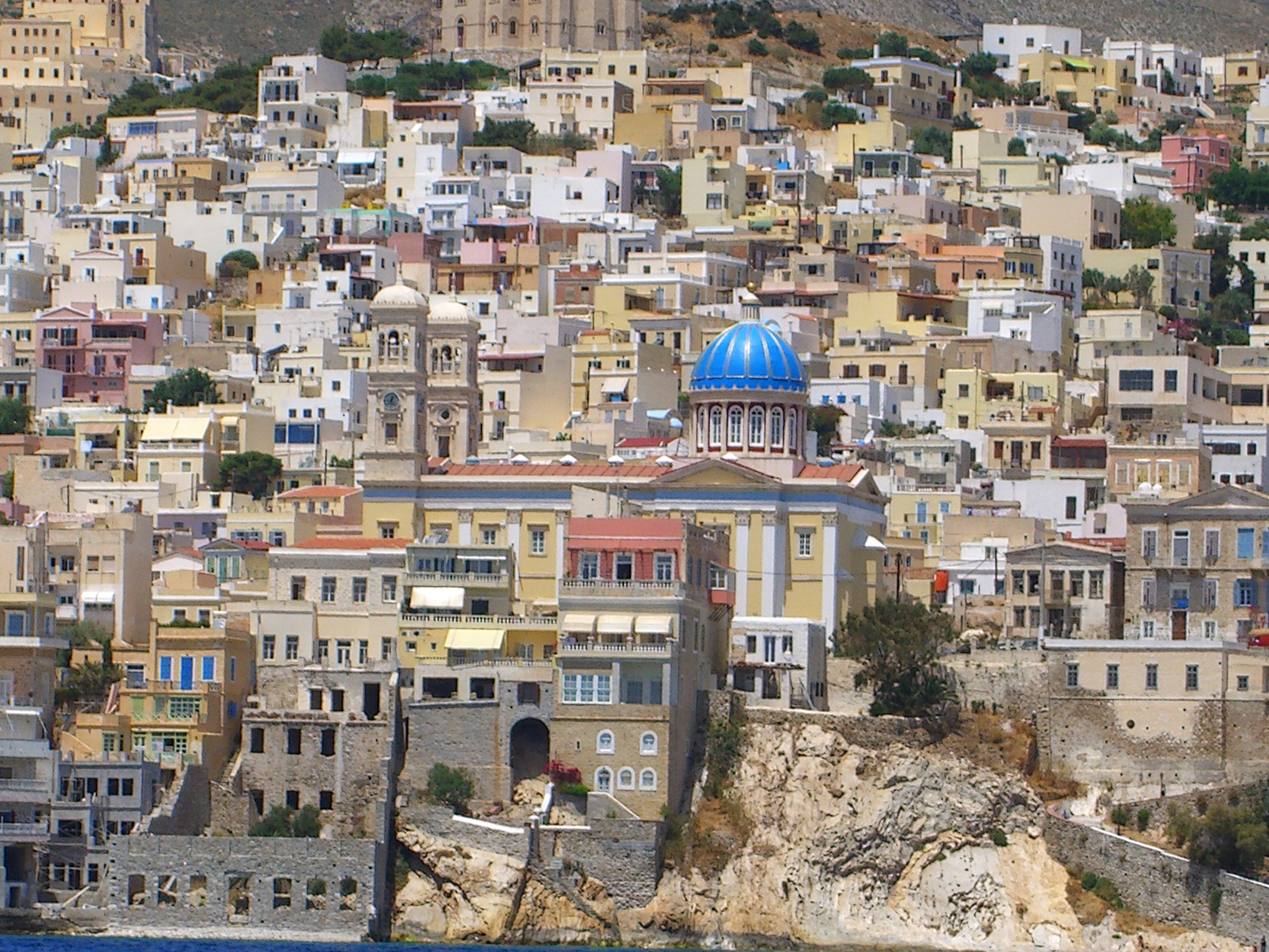 Posidonos, Ermoupoli 841 00, Greece